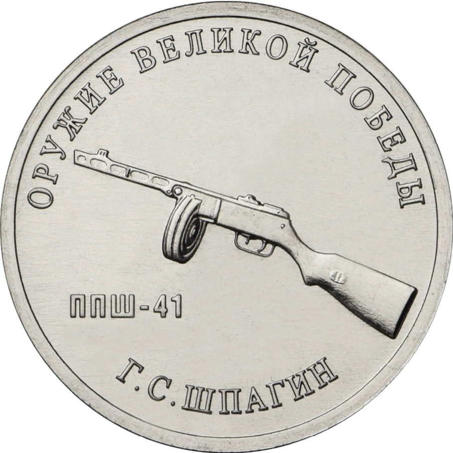 Монета Банка России. 25 рублей, реверс, анциркулейтед. Медно-никелевый сплав. Серия «Оружие Великой Победы (конструкторы оружия)». Конструктор оружия Г.С. Шпагин, пистолет-пулемёт Шпагина. Рельефное изображение пистолета-пулемета Шпагина, слева – надпись «ППШ-41»; вдоль канта – надписи, вверху: «ОРУЖИЕ ВЕЛИКОЙ ПОБЕДЫ», внизу: «Г.С. ШПАГИН». Художник: О.Г. Шепель. Скульптор: компьютерное моделирование. Московский монетный двор.